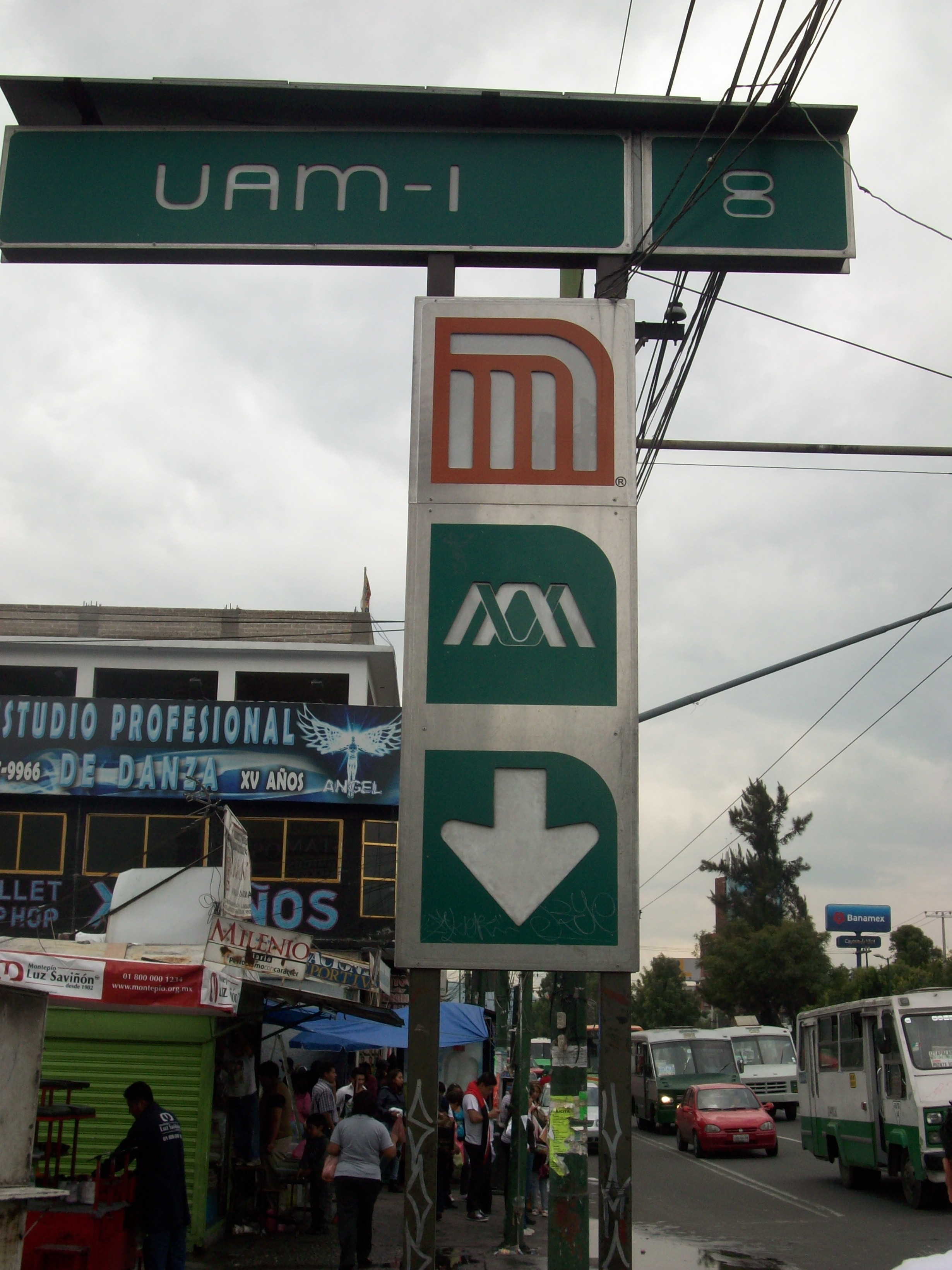 Estela estación UAM-I